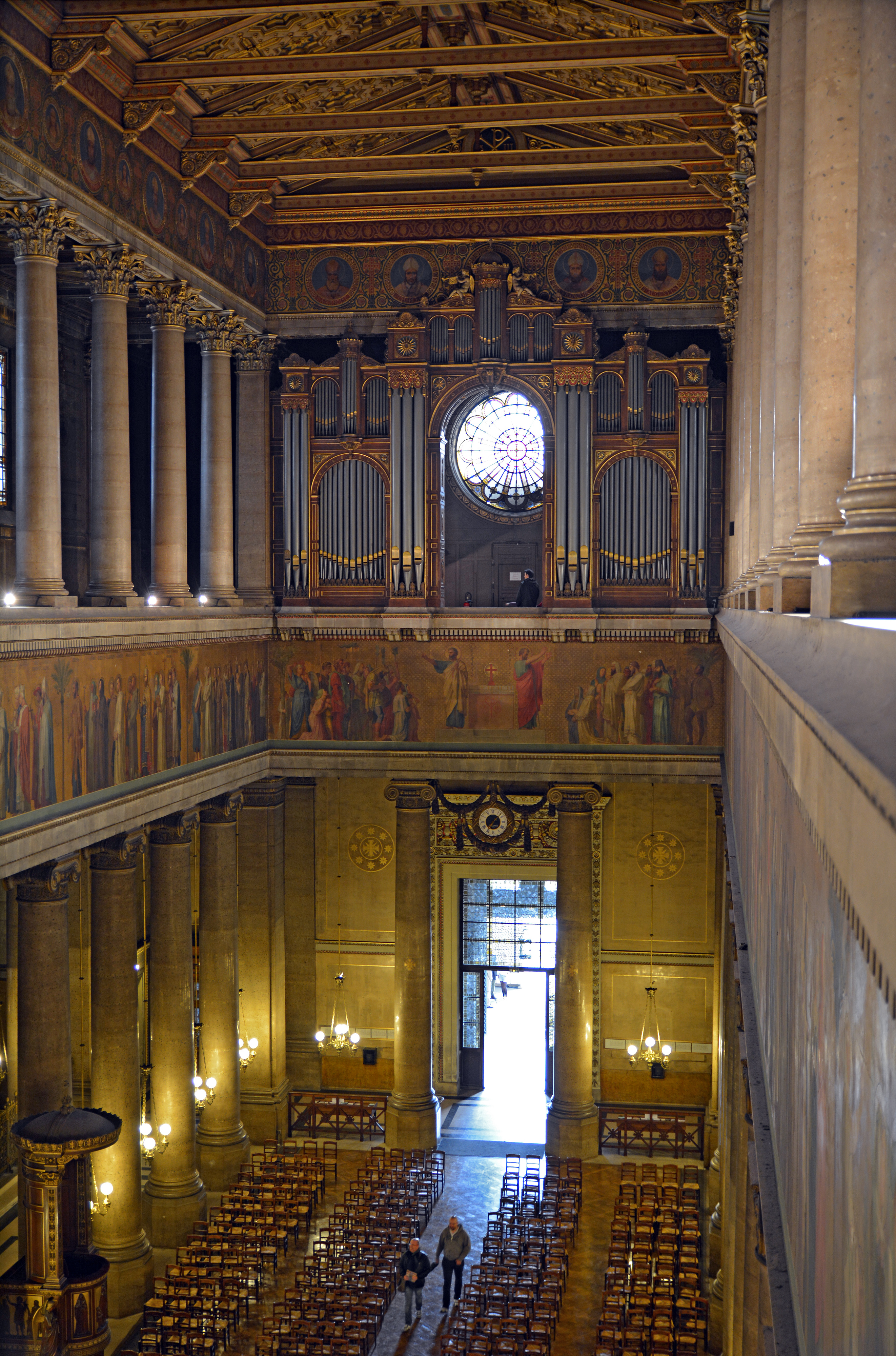 Église Saint-Vincent-de-Paul, Paris 10 arrdt, France. Vue depuis la galerie